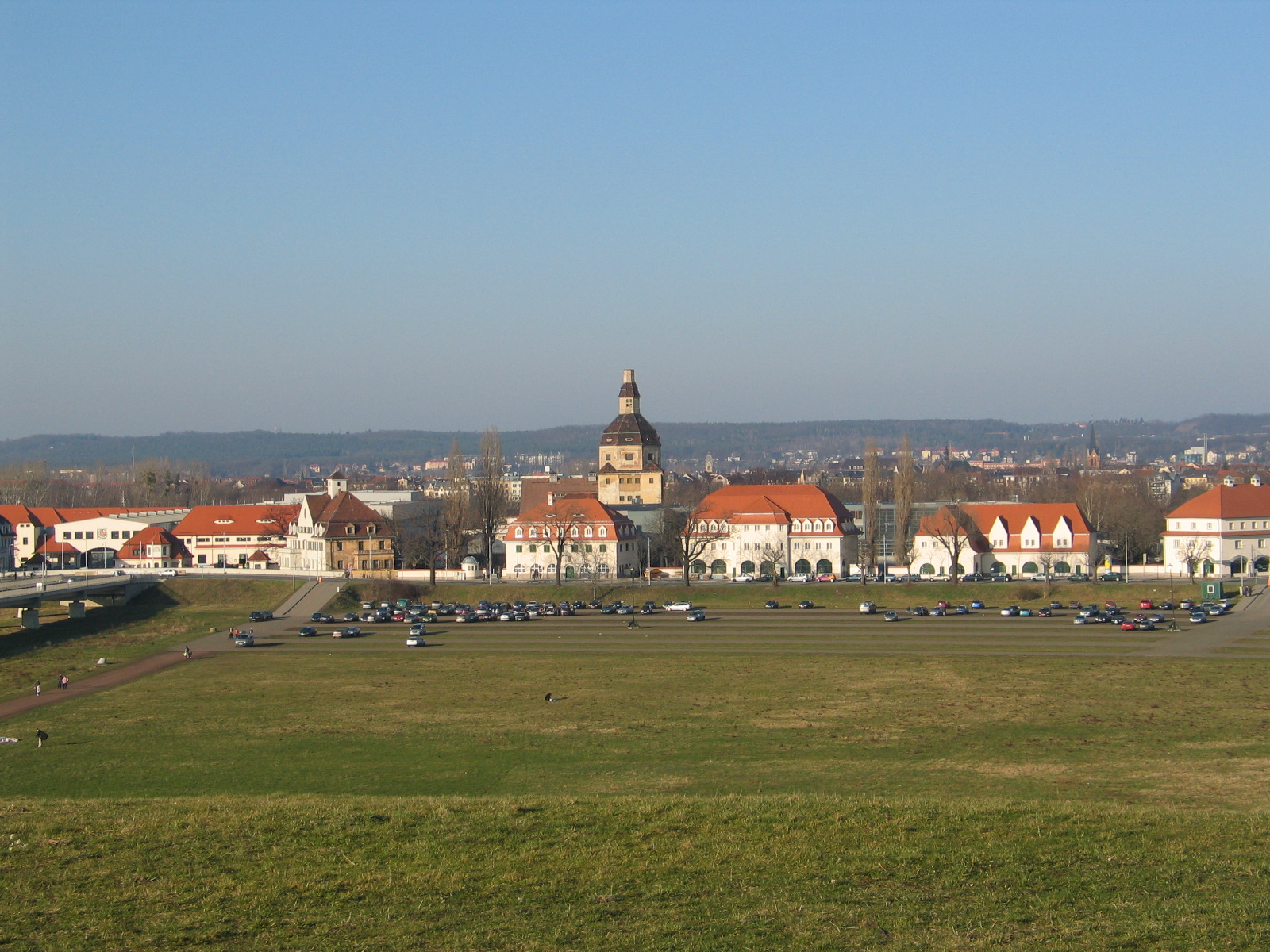 Die Flutrinne im Ostrahegege Dresden, in der Mitte dahinter der Erlweinsche Vieh- und Schlachthof